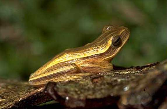 Hypsiboas leptolineatus